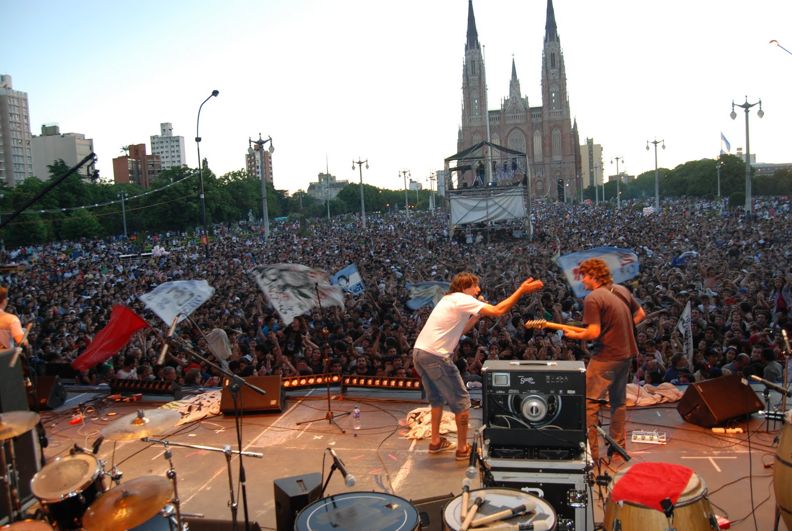 "La Cumpa" en un recital en Plaza Moreno (La Plata)